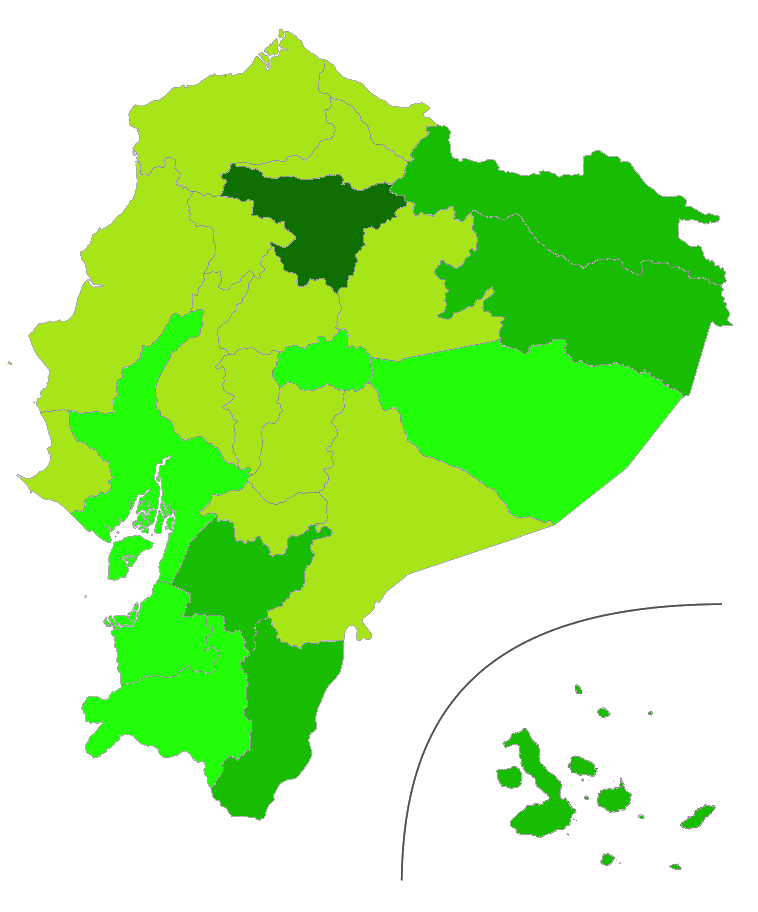 Provincias por Ecuador por índice de Desarrollo Humano (2016). Reporte no oficial del PNUD.